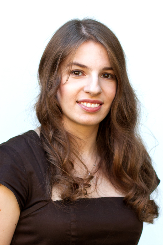 Marina Weisband, politische Geschäftsführerin der Piratenpartei Deutschland